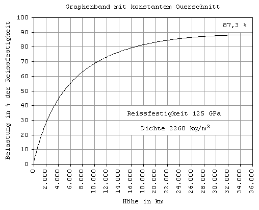 Weltraumlift aus Graphen mit konstantem Querschnitt